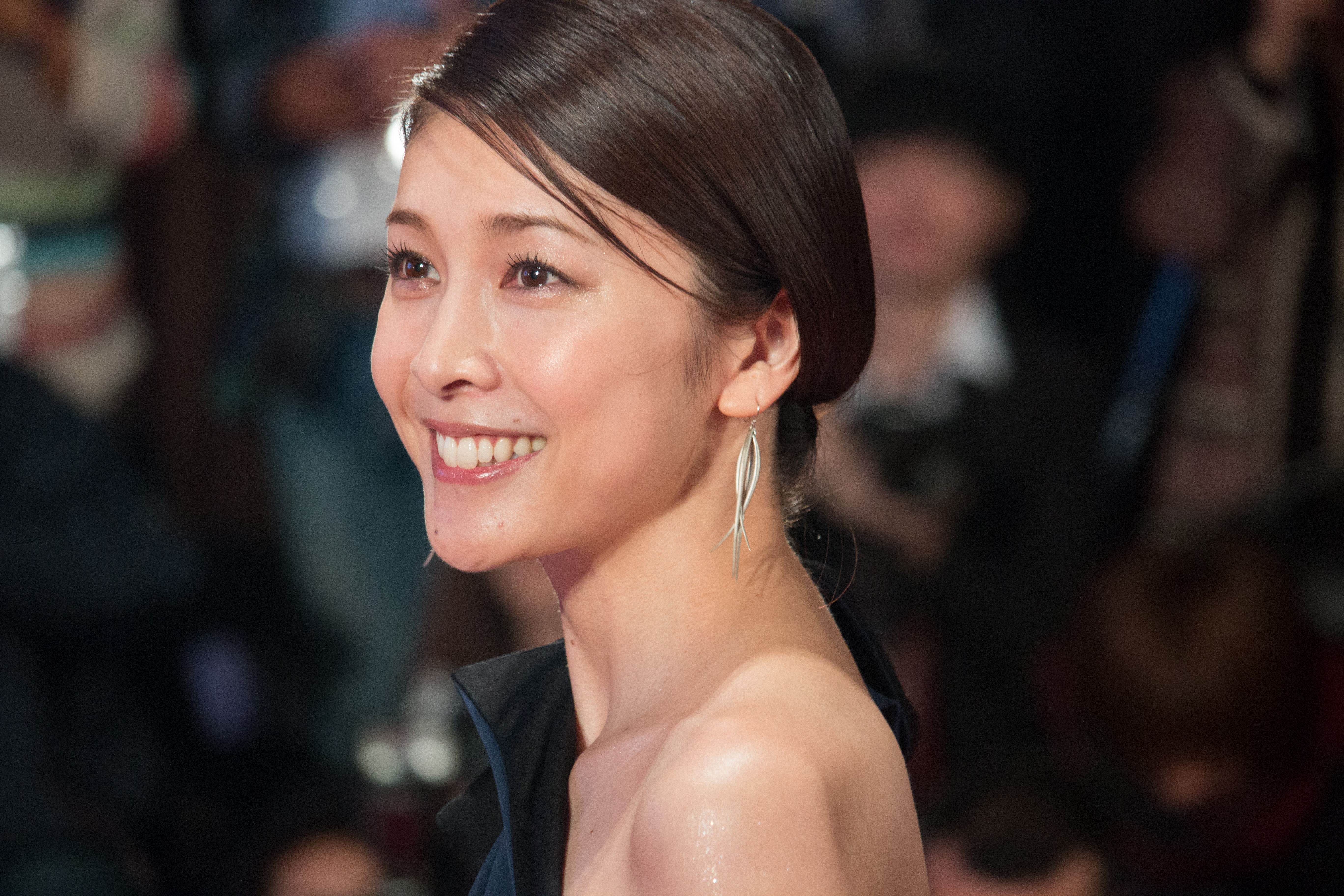 第28回 東京国際映画祭 オープニングセレモニー 竹内結子 (残穢 -住んではいけない部屋-)